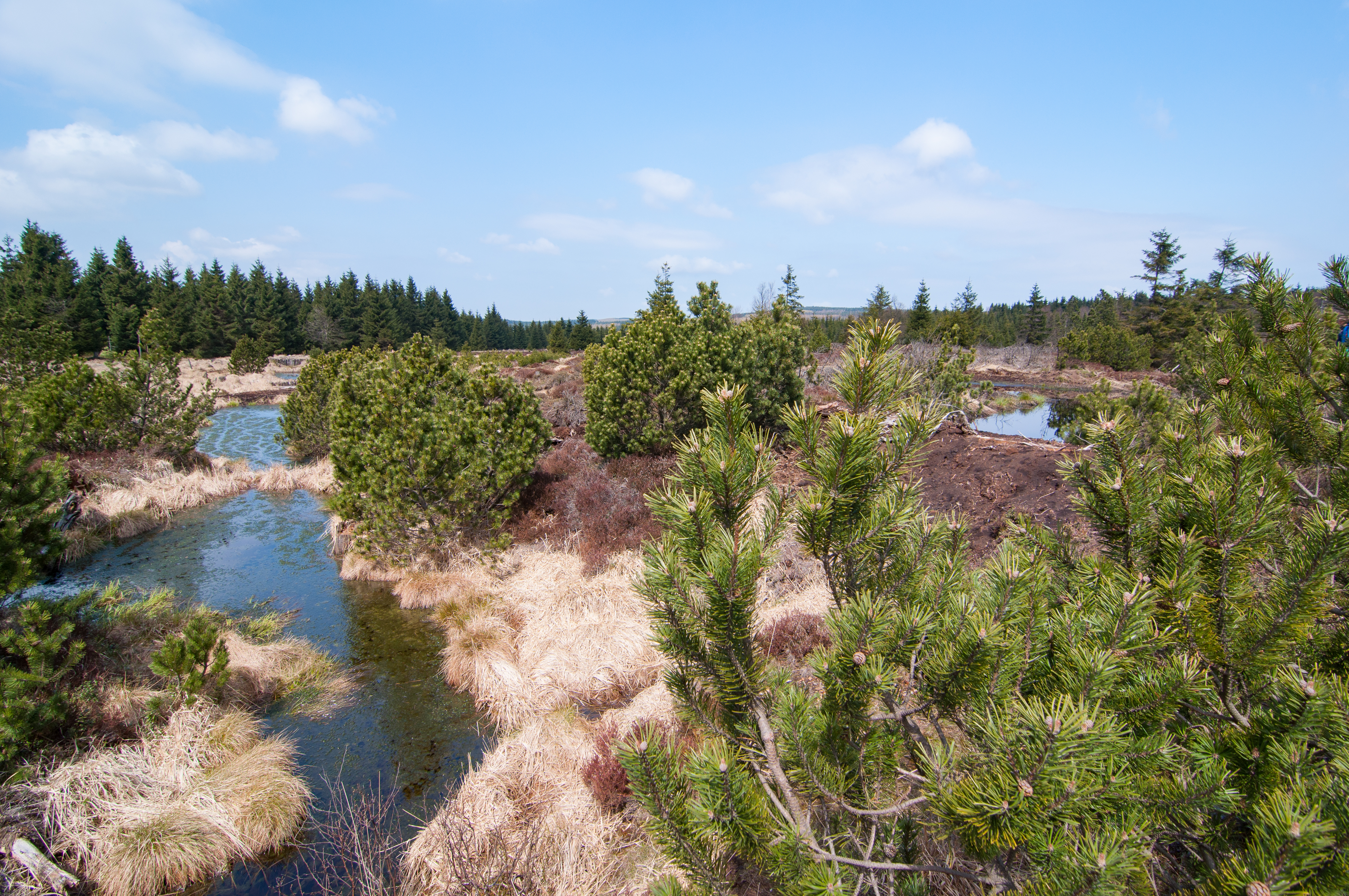 Wasserreiche Stelle zwischen Moorkiefern im Naturschutzgebiet „Georgenfelder Hochmoor“ (NSG D46) bei Zinnwald-Georgenfeld im Landkreis Sächsische Schweiz-Osterzgebirge in Sachsen